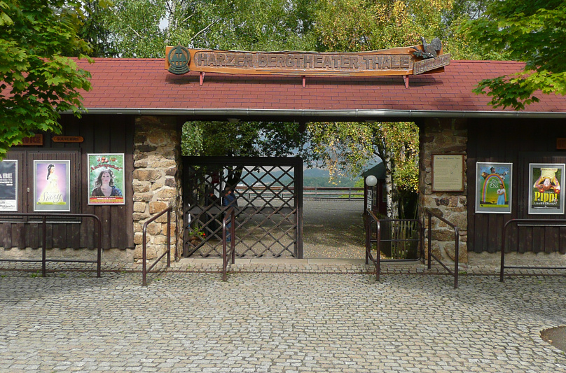 Bergtheater Thale